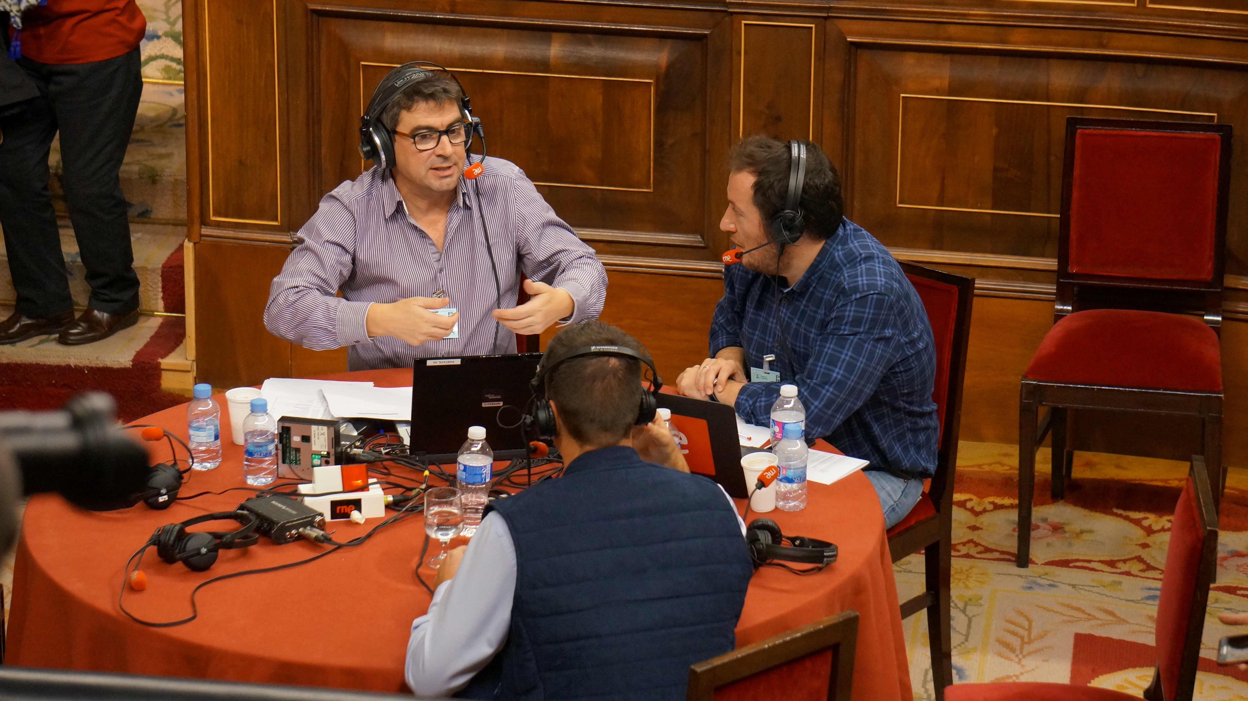 Parte del equipo de "Esto me suena" durante la emisión desde el Congreso de los diputados de España durante las jornadas de puertas abiertas 2016